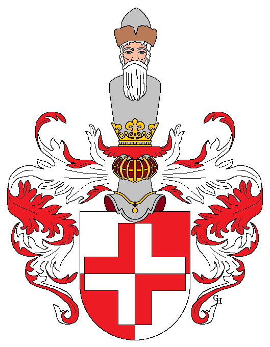 Wappen des österreichischen Arztes und Mäzens Dr. Josef Winter (1857–1916), verliehen anlässlich seiner Erhebung in den österreichischen Adelsstand als "Edler von Wigmar" 1914. Zeichnung von Gerd Hruška ( Für weitere Informationen zu dieser Standeserhebung siehe (